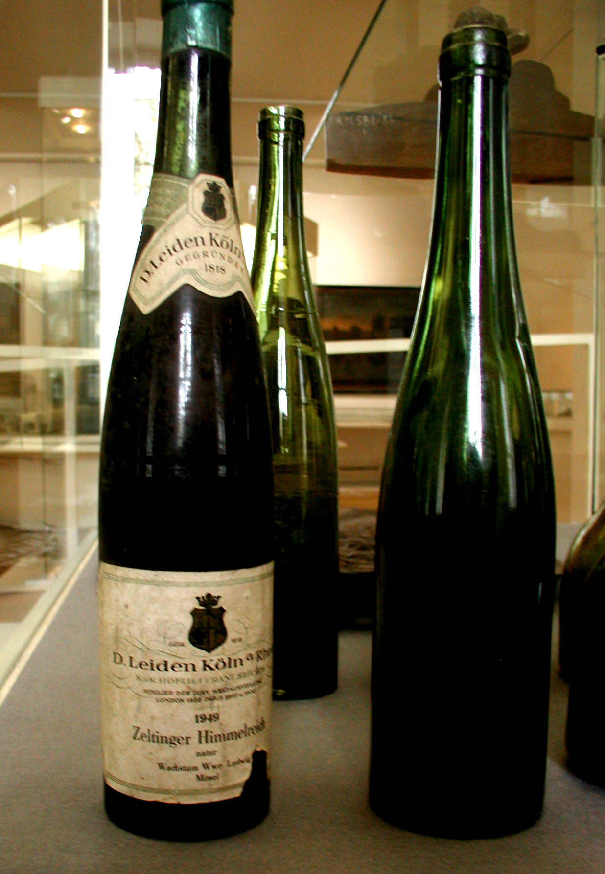 Köln, Flasche aus dem Weinhandel D. Leiden, einer 1818 geründeten Firma. D. Leiden Köln a. Rhein. K. u. K. Hoflieferant seit ... Mitglied der Jury Weltausstellungen London 1862,..Paris 18.. 19.Jh.,1949 Zeltinger Himmelreich Wachstum Wwe. Ludwig ...Mosel